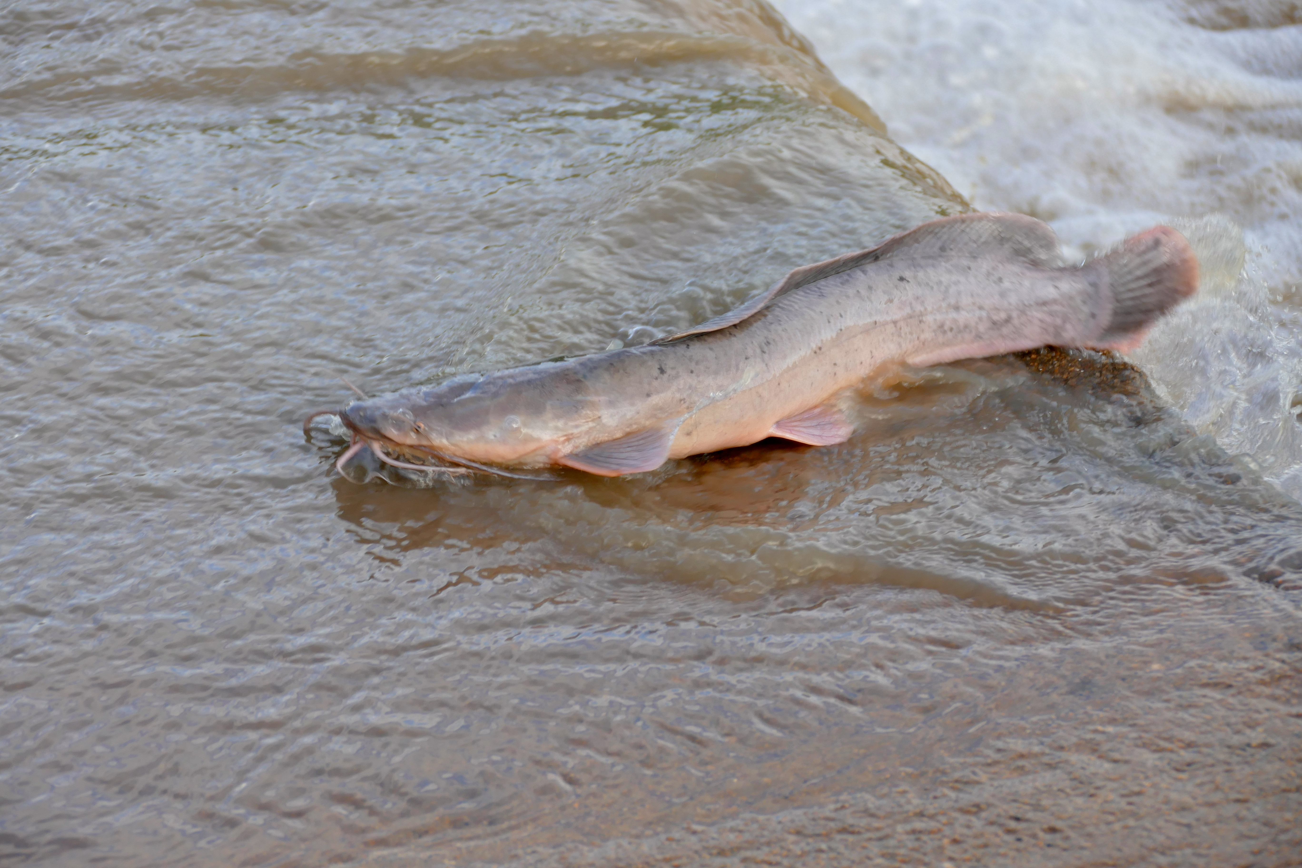 Mlondozi Ford, S129 Road North of Lower Sabie, Kruger NP, SOUTH AFRICA